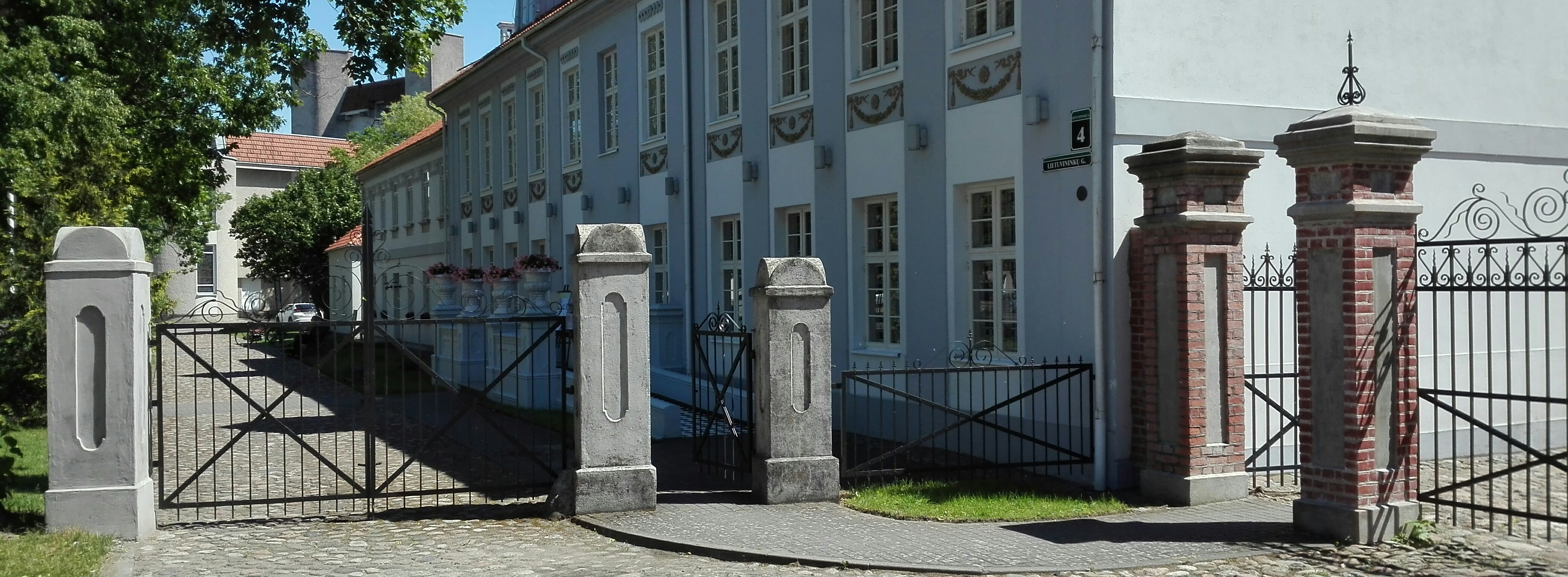 Hugo Šojaus dvaro vartai